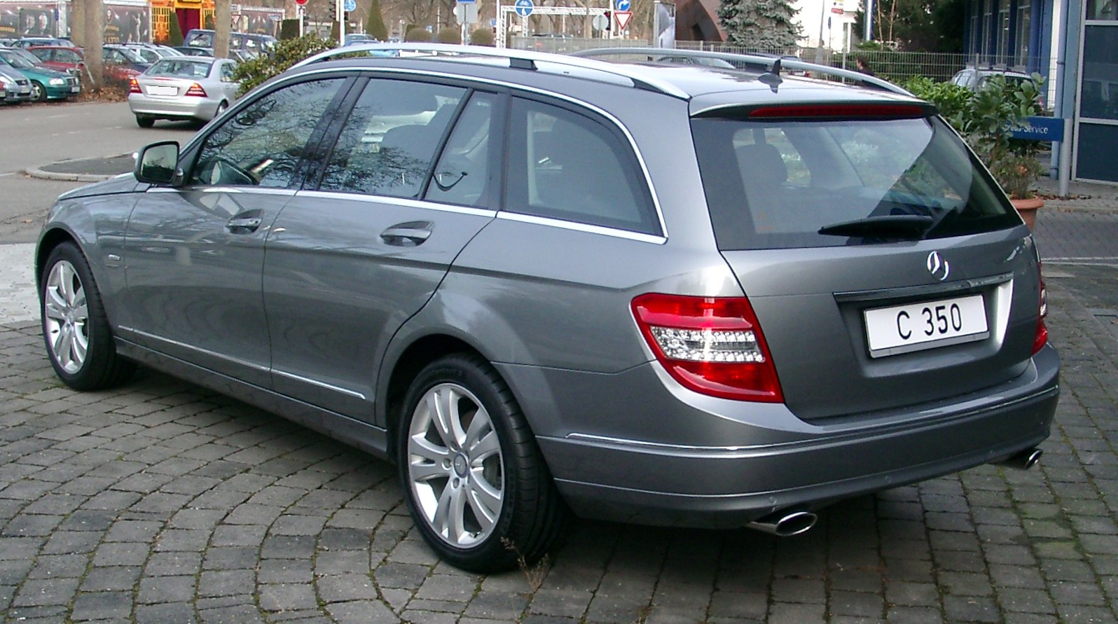 Mercedes-Benz W204 T-Modell (S 204)